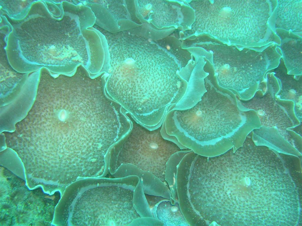 Großes Elefantenohr (Amplexidiscus fenestrafer)